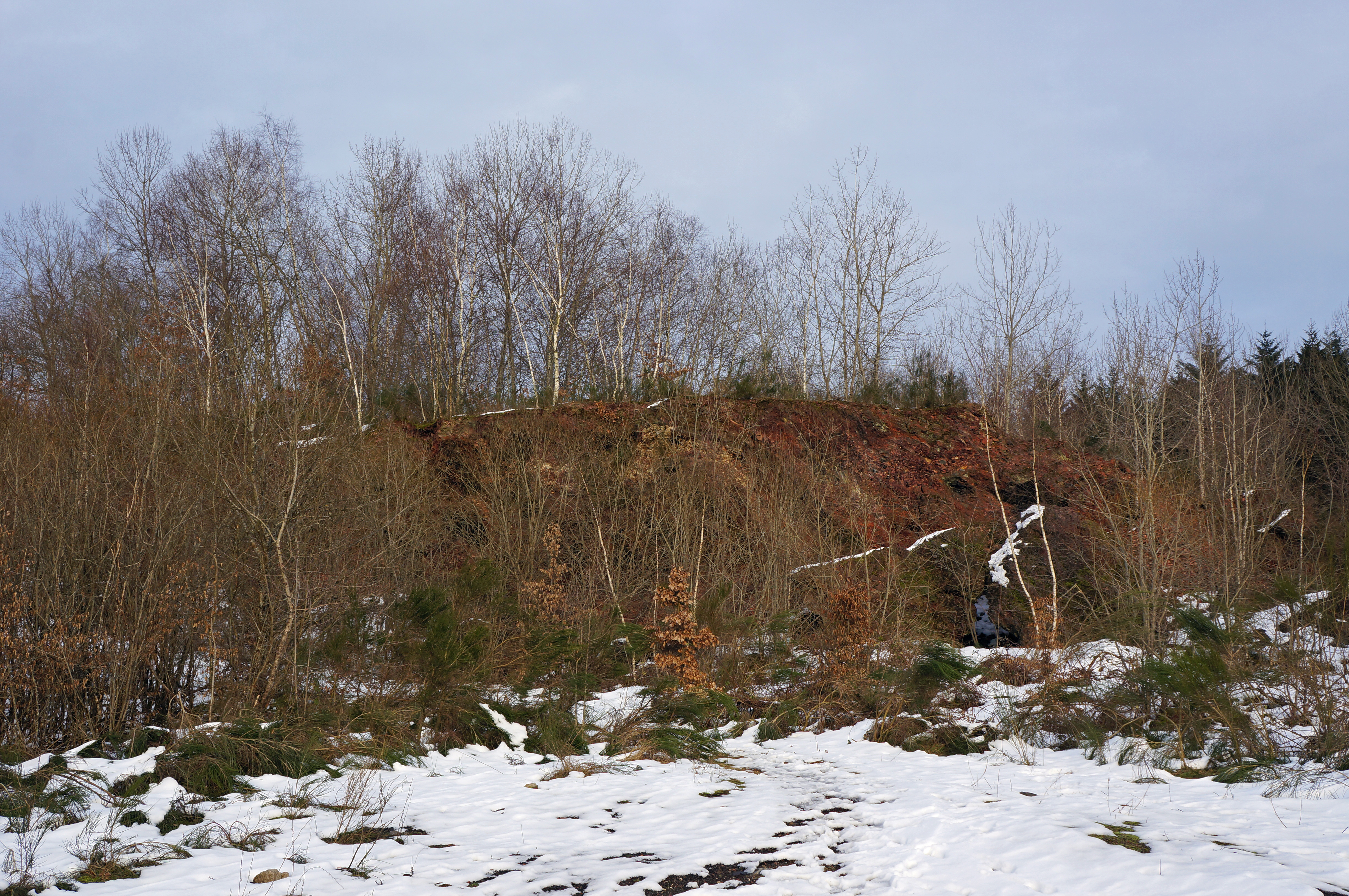 Restes de l'ancien terril du puits Arthur de Buyer.